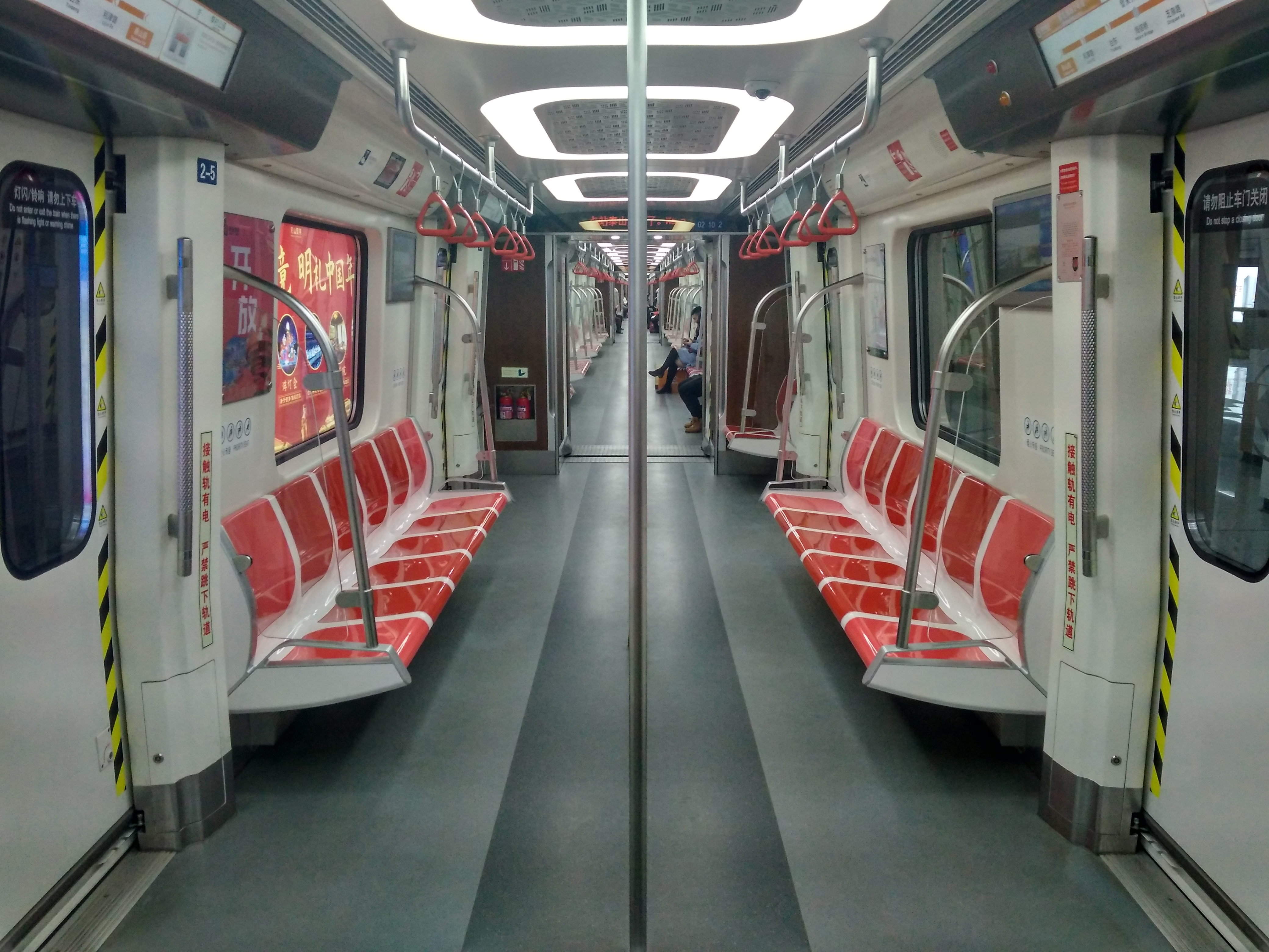 中文（中国大陆）: 青岛地铁2号线列车内部